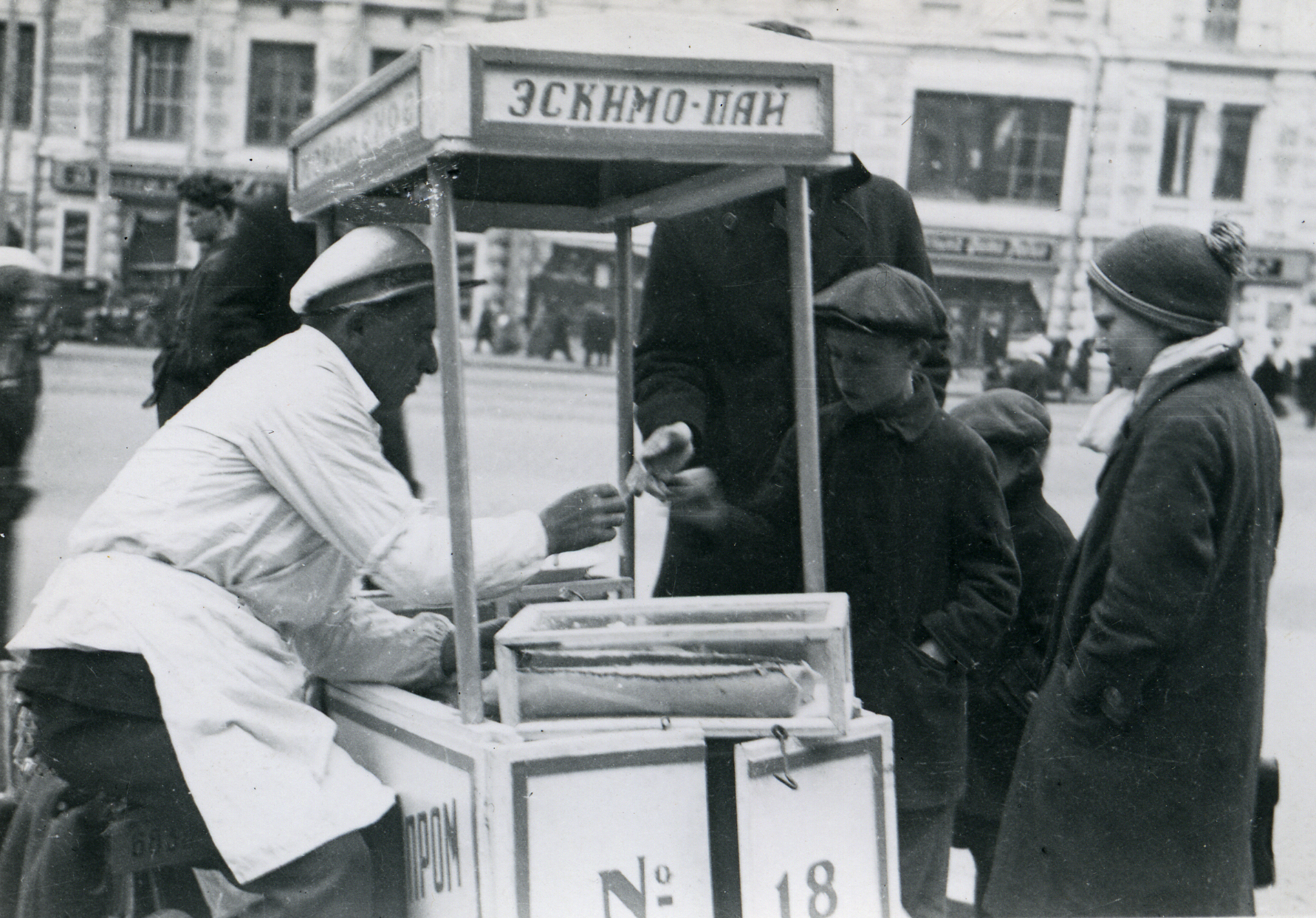 Торговля мороженым, 1935, СССР (место?). Фото Эрик Сундвор Format: Fotopositiv Dato / Date: 1935 Fotograf / Photographer: Eirik Sundvor (1902 - 1992) Sted / Place: Sovjetunionen - Moskva? Eier / Owner Institution: Trondheim byarkiv, The Municipal Archives of Trondheim Arkivreferanse / Archive reference: Tor.H46.B08.F22706 Merknad: Fra en reise til Sovjetunionen foretatt av Eirik Sundvor omkring 1935. Eirik Sundvor (1902 - 1992) var journalist i Avisa Nidaros 1924 - 1940 og 1945 - ca. 1957. Sundvor flyktet til England med sin kone under krigen. Der var han redaksjonssekretær i Norsk Tidend i London. Sundvor hadde god kjennskap til russisk, og ble derfor sendt som major med oberst Arne Dahls ekspedisjon til Finnmark i 1944 / 1945. Sundvor stod for utgivelsen av den første frie norske avis i Finnmark i 1945. Etter at Avisa Nidaros gikk inn som dagsavis flyttet han tilbake til Bergen, hvor han opprinnelig kom fra. Her virket han som korrespondent for Dagbladet i Vest-Norge.